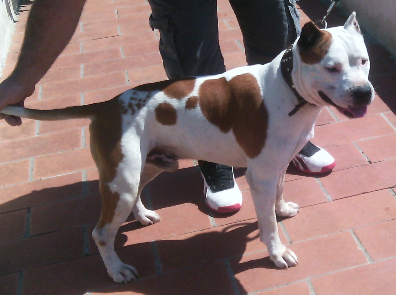 esemplare di american pit bull terrier. UKC